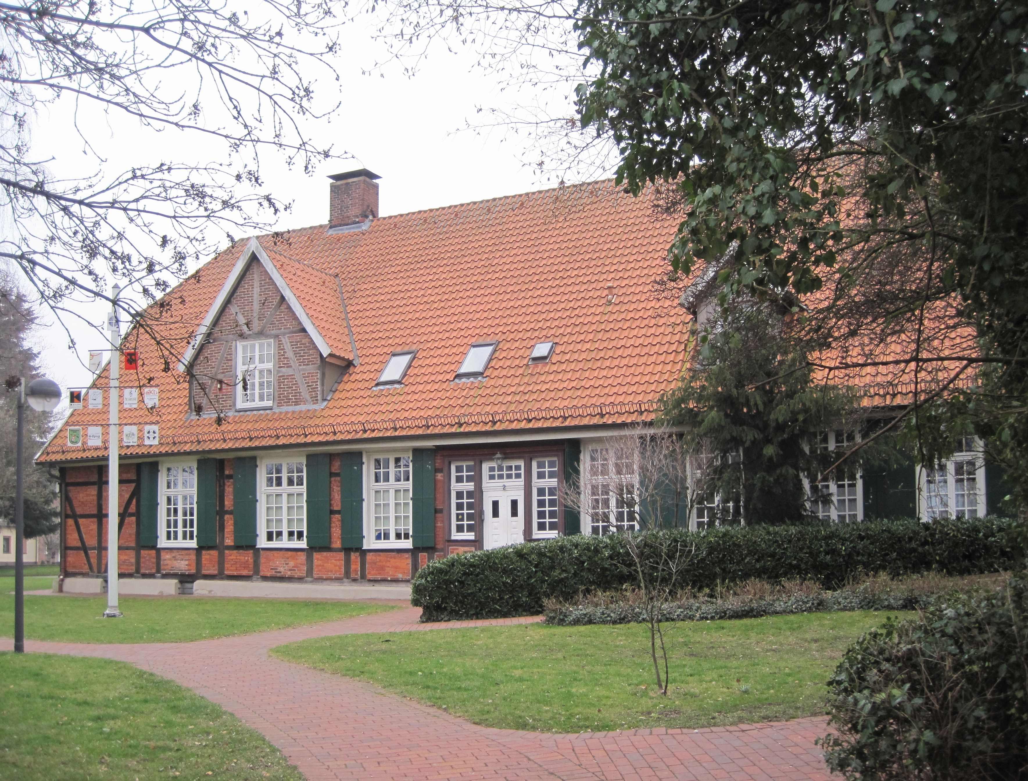 Das Foto zeigt die Vikarie der Pankratiuskirche in Hamm-Bockum-Hövel.